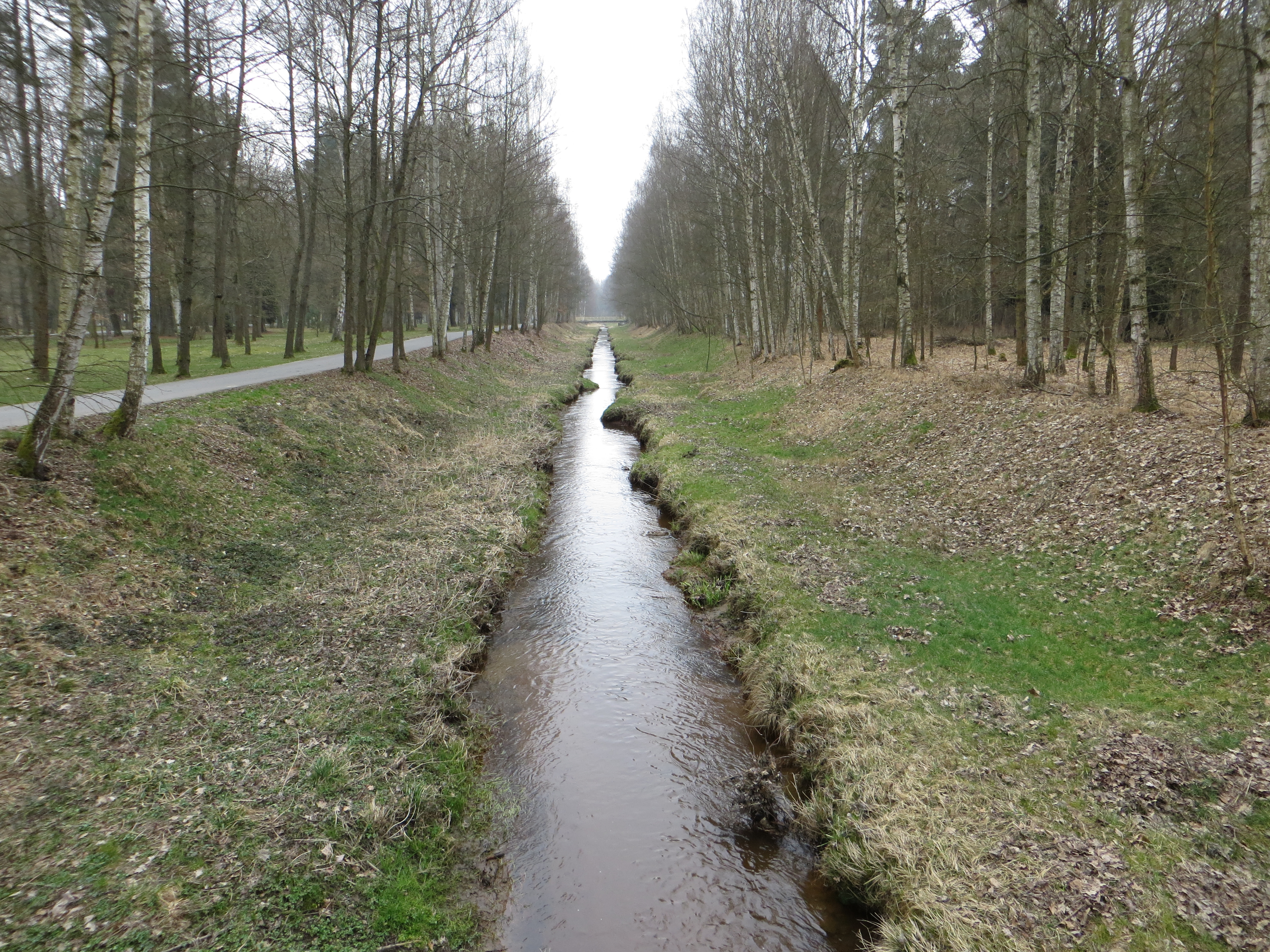 Bach Slatinny potok in franzenbad